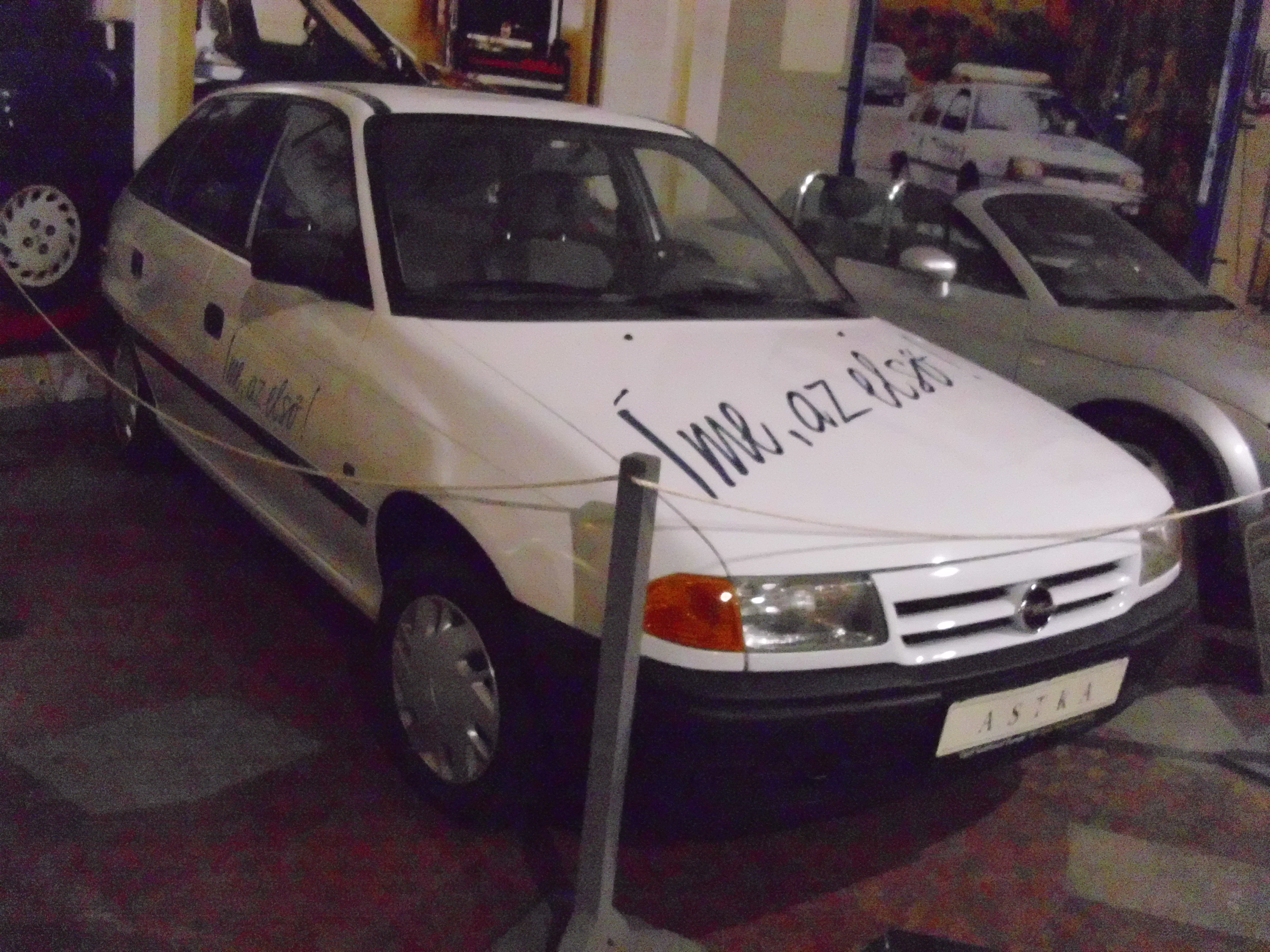 Opel Astra F von 1992 aus ungarischer Produktion im Technikmuseum von Budapest